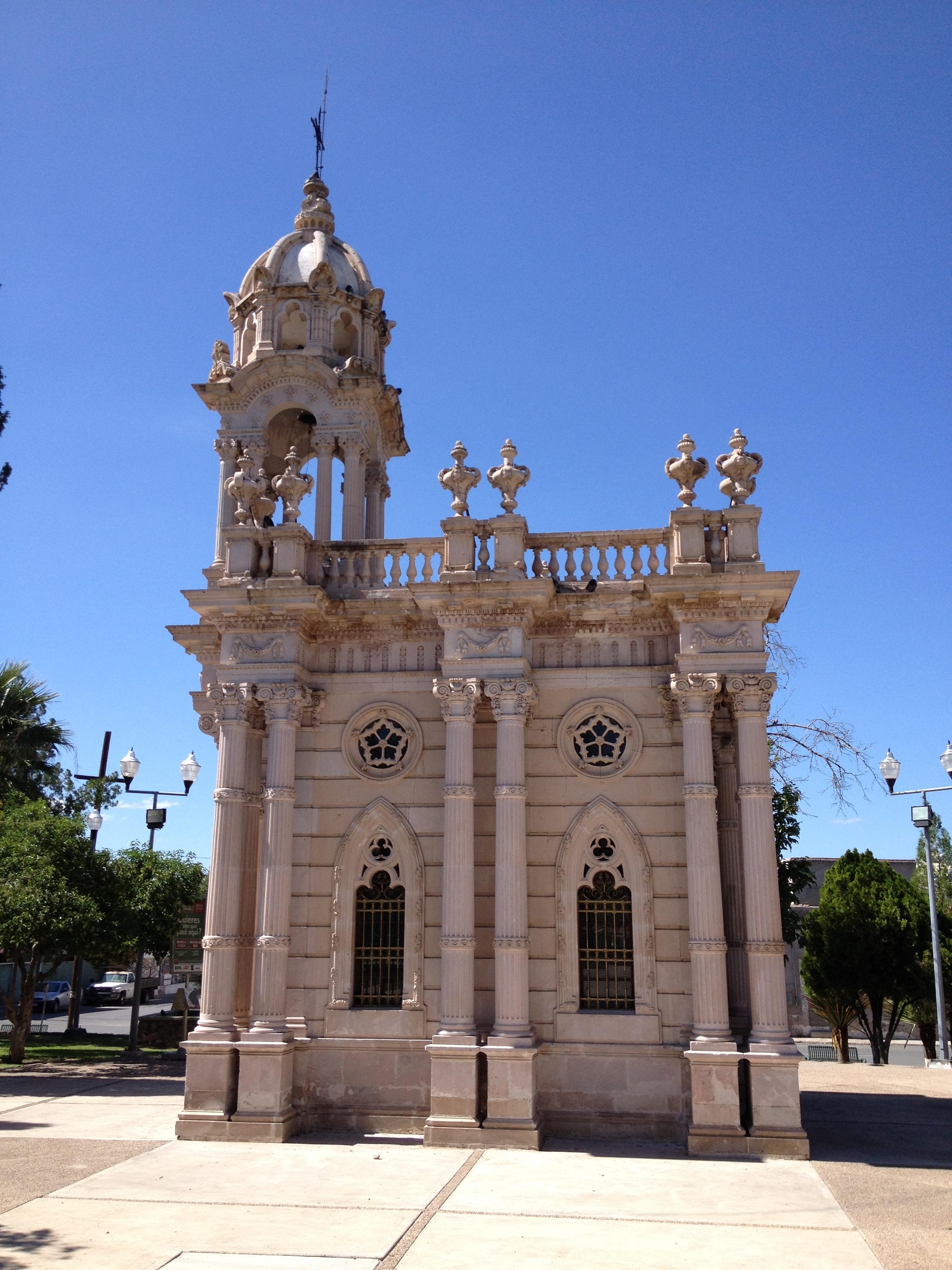 Mausoleo o Capilla de Francisco Villa en Chihuahua